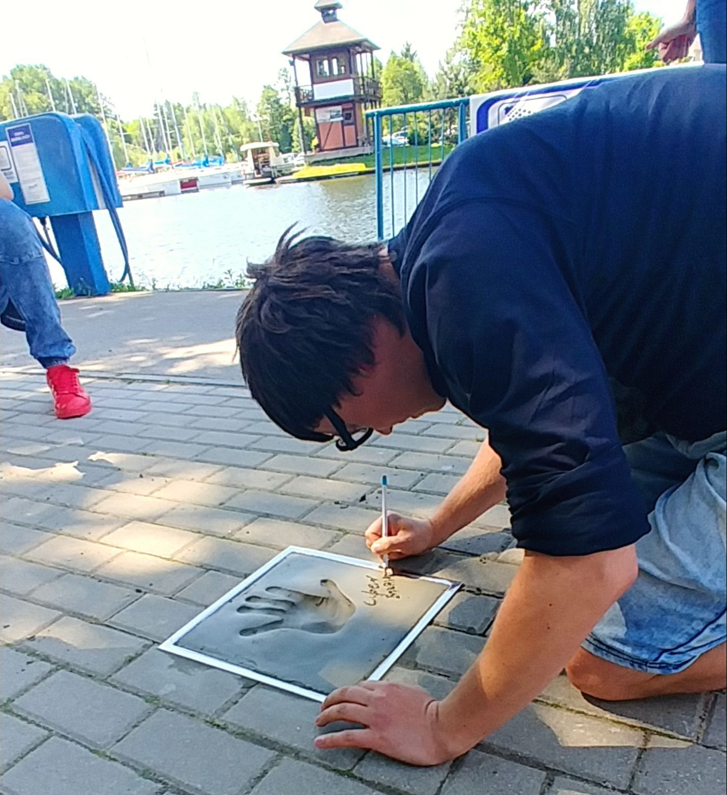 W dniu 2 czerwca 2019 roku, Cyber Marian jako pierwszy odcisnął swoją dłoń na Węgorzewskiej Alei Gwiazd